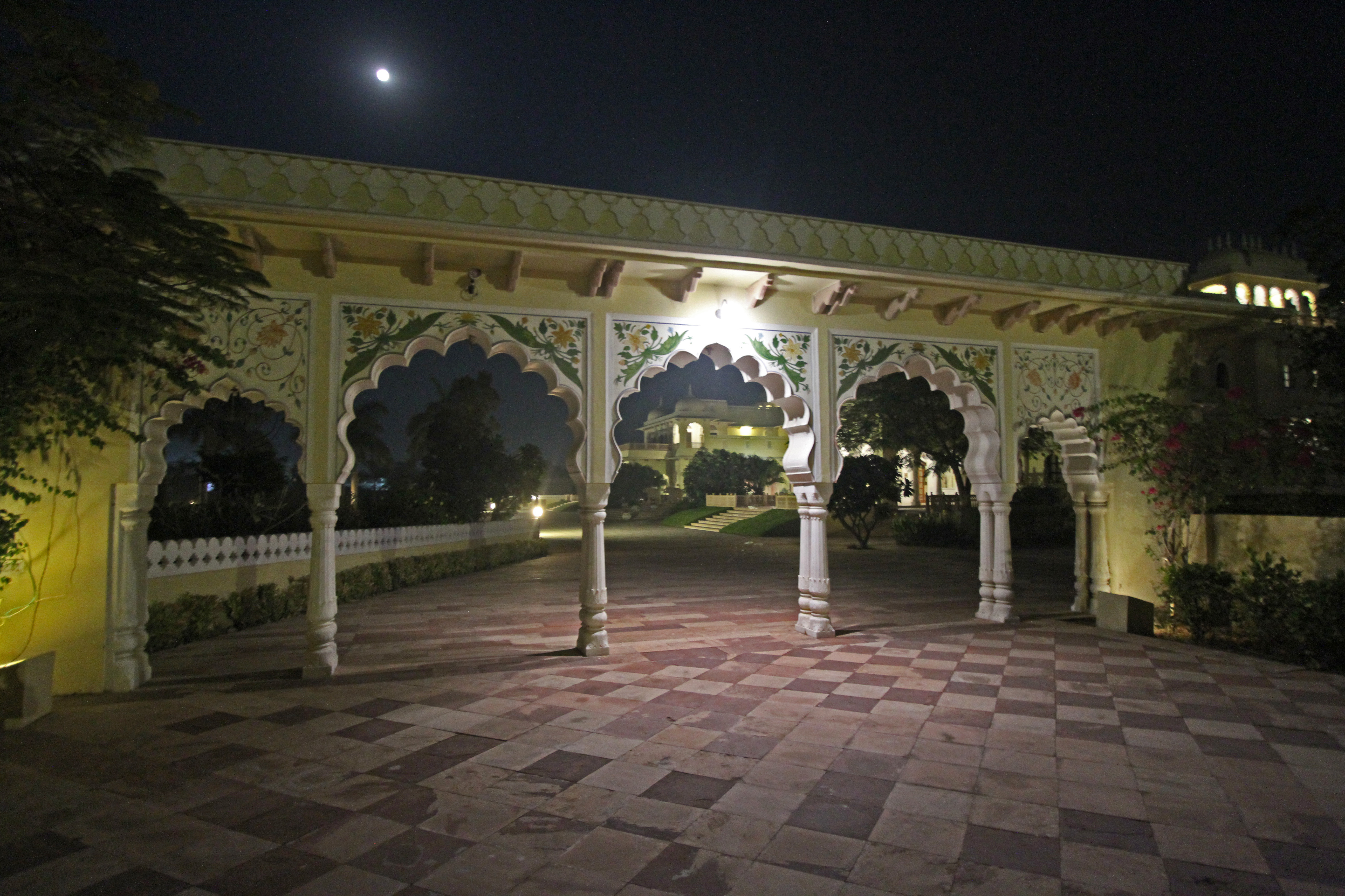 Laxmi Vilas Palace (Bharatpur)